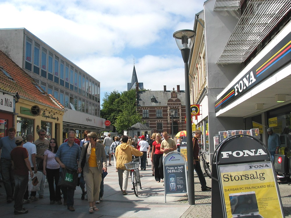 Blick in Thisted (Dänemark) von der Storegade Richtung Marktplatz.